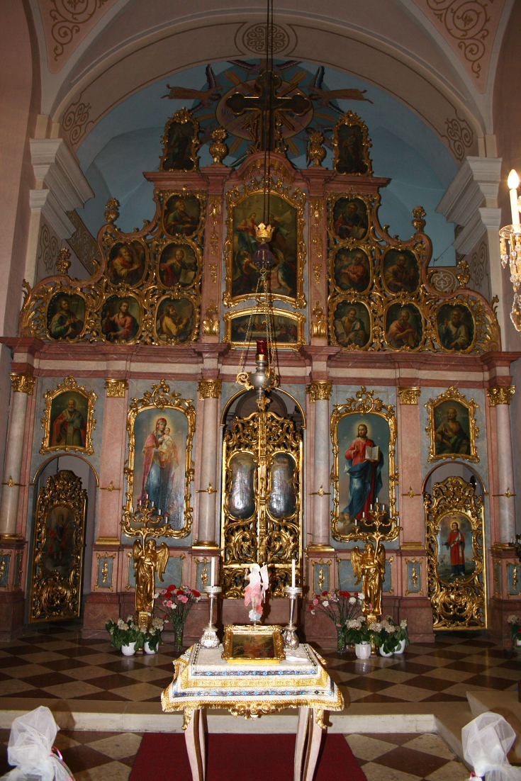 Hochaltar der Barbarakirche in Wien.